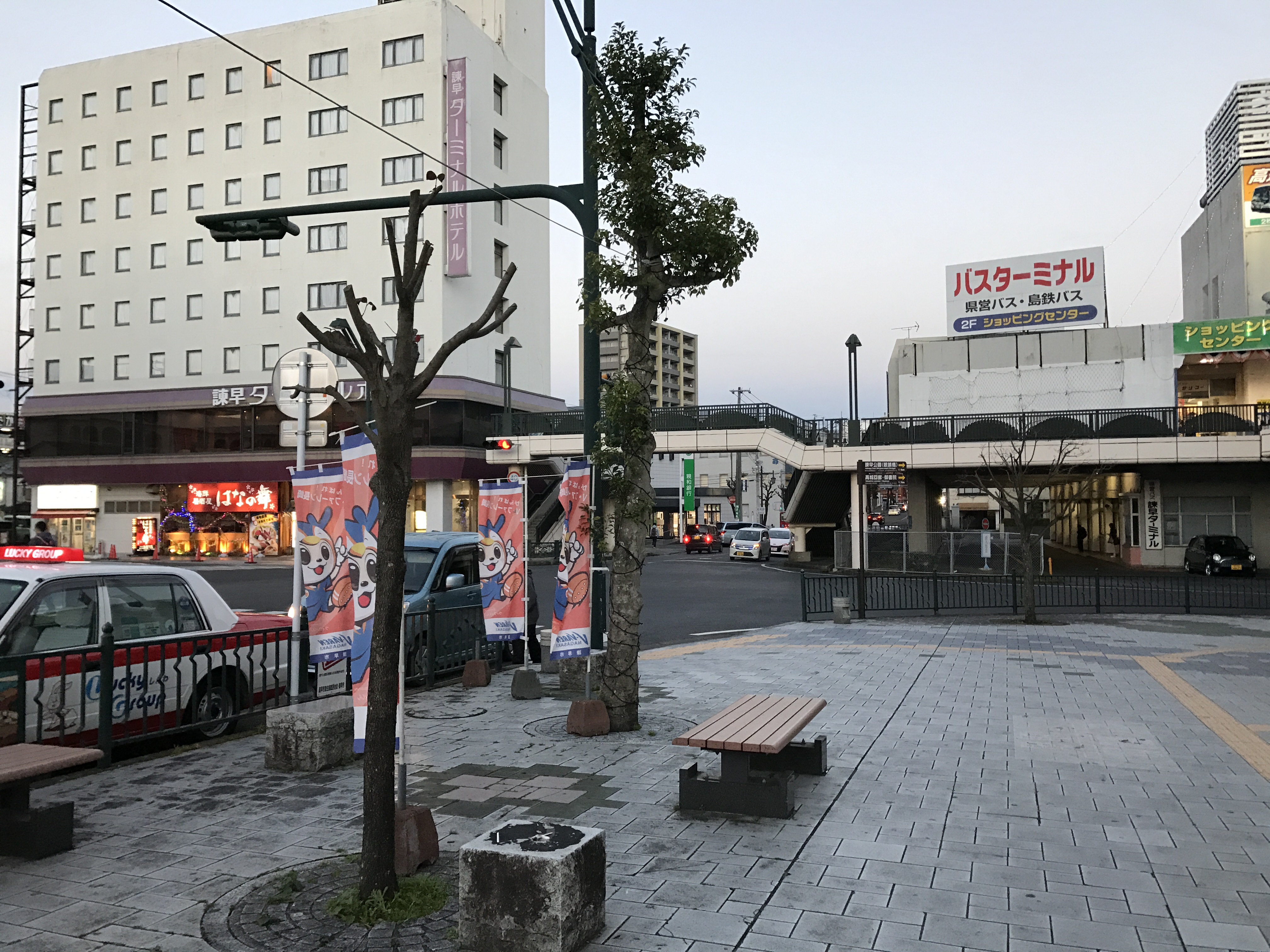 諫早駅前の様子